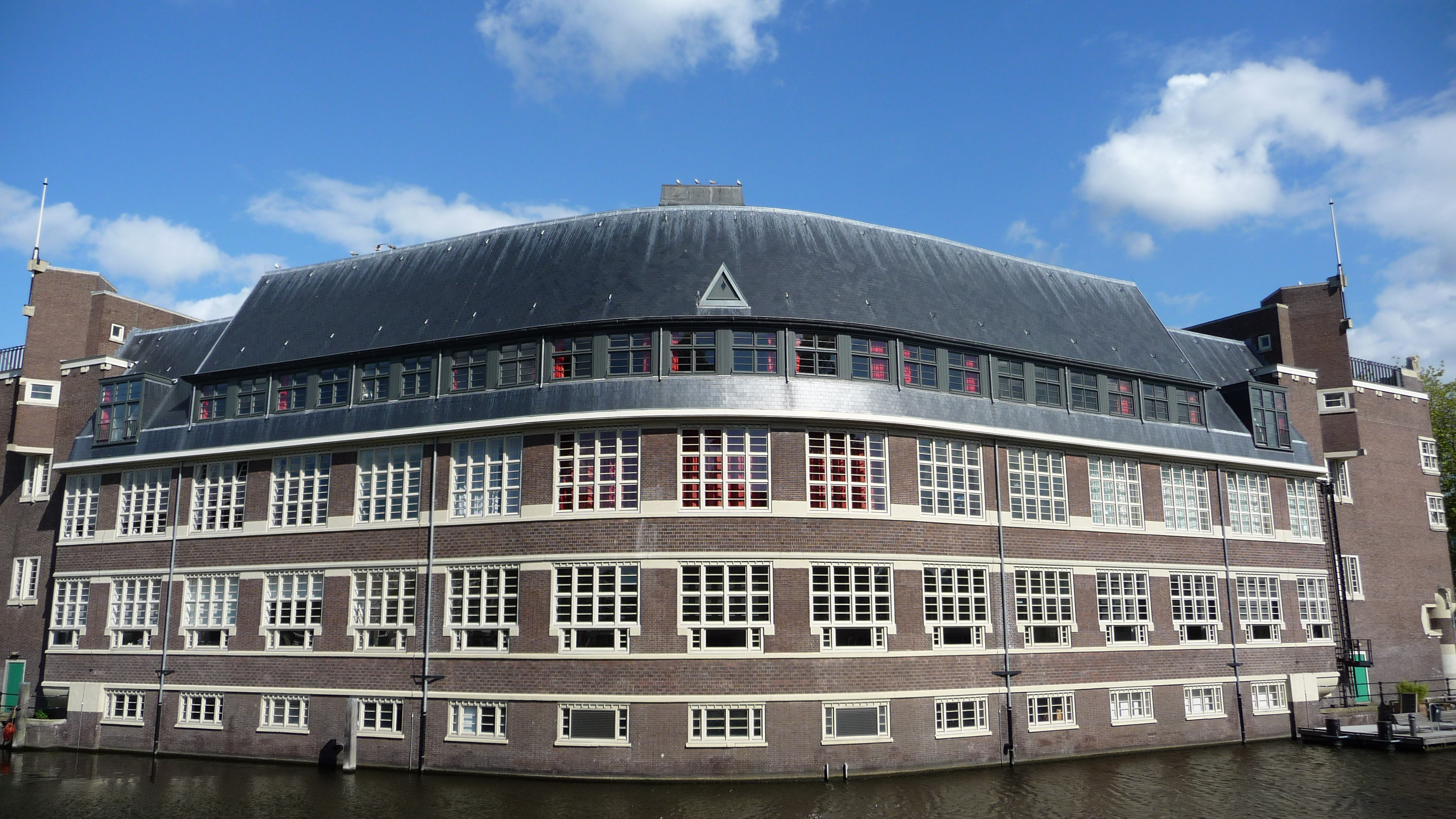 Rijksmonument Postjesweg 1, Amsterdam